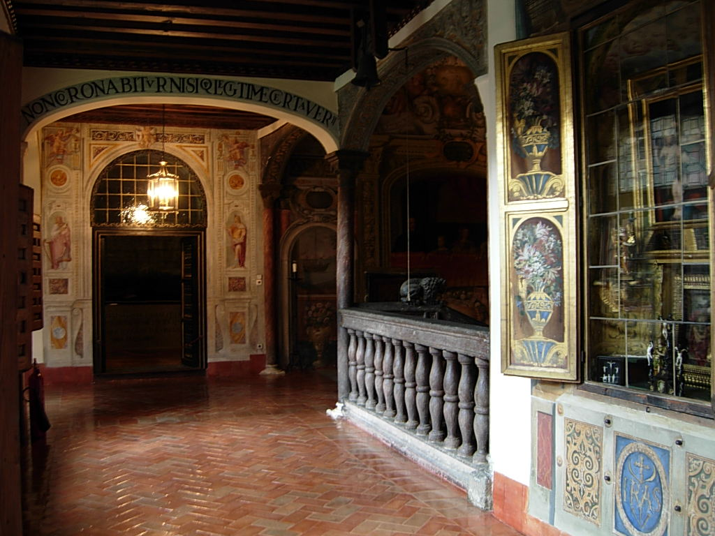 Monastero de Las Descalzas Reales Foto personale concessa in PD